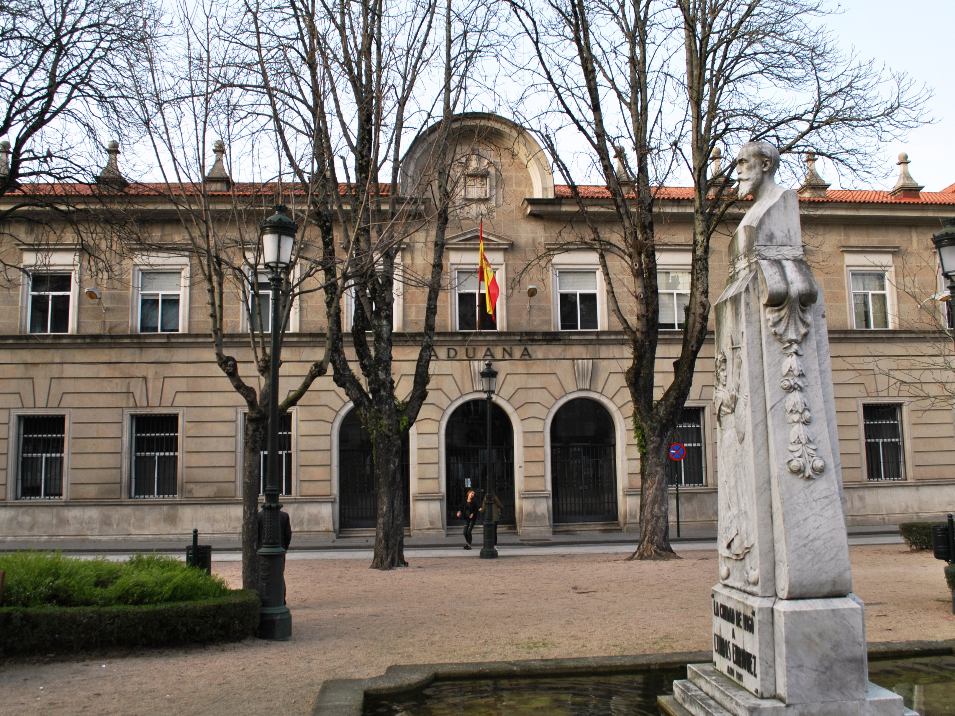 Véxase o título e as categorías